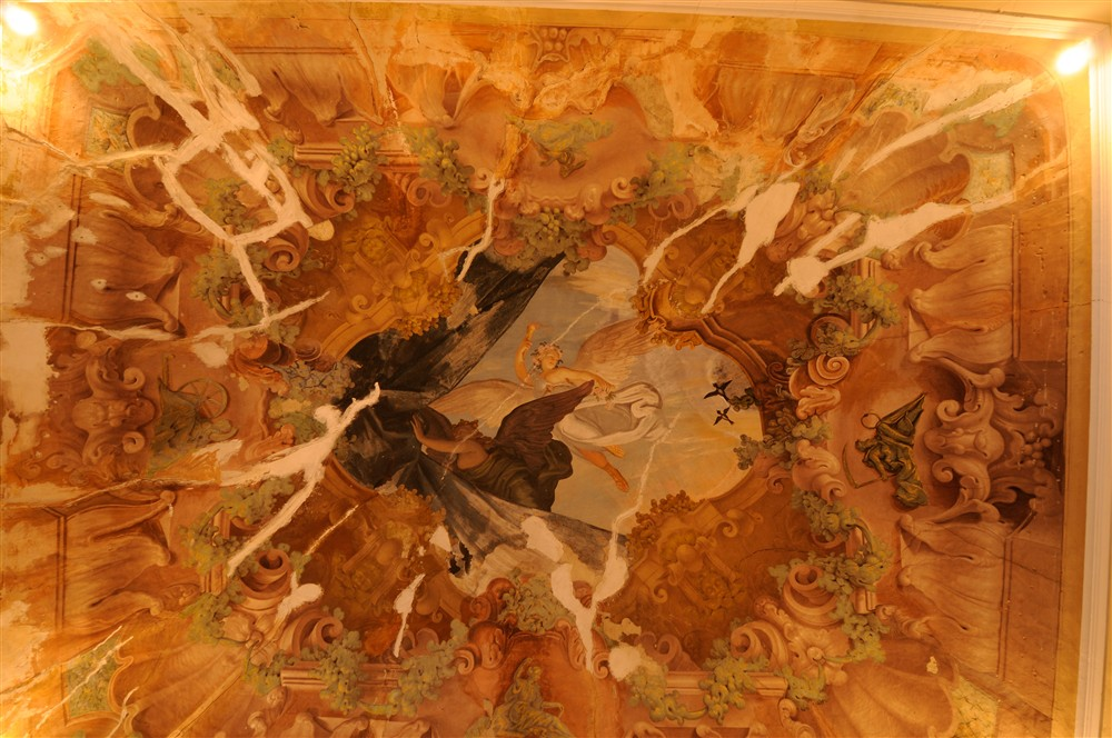 particolare affresco Nicolò Berrettoni